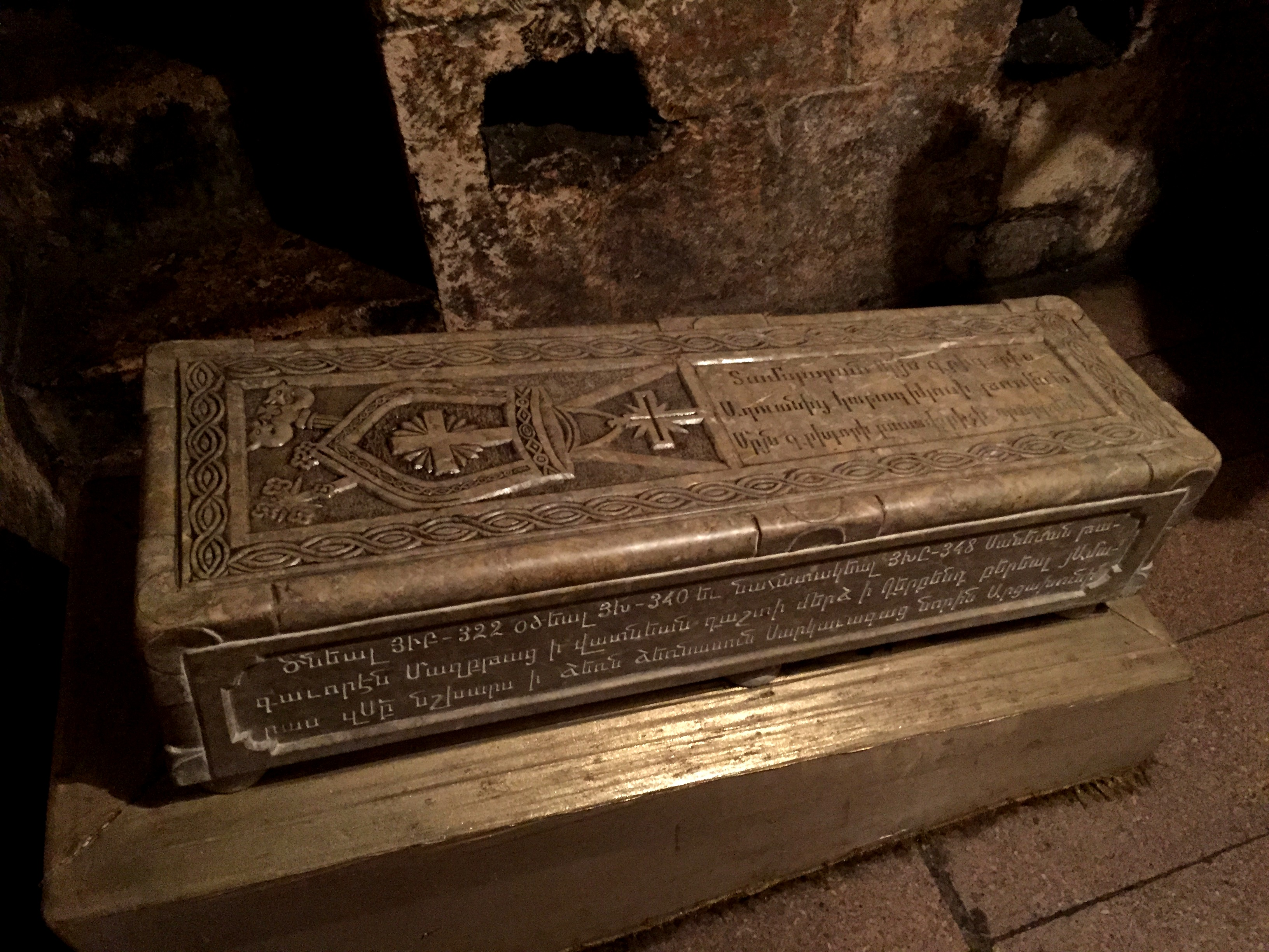 Grigoris mausoleum Artsakh Sos